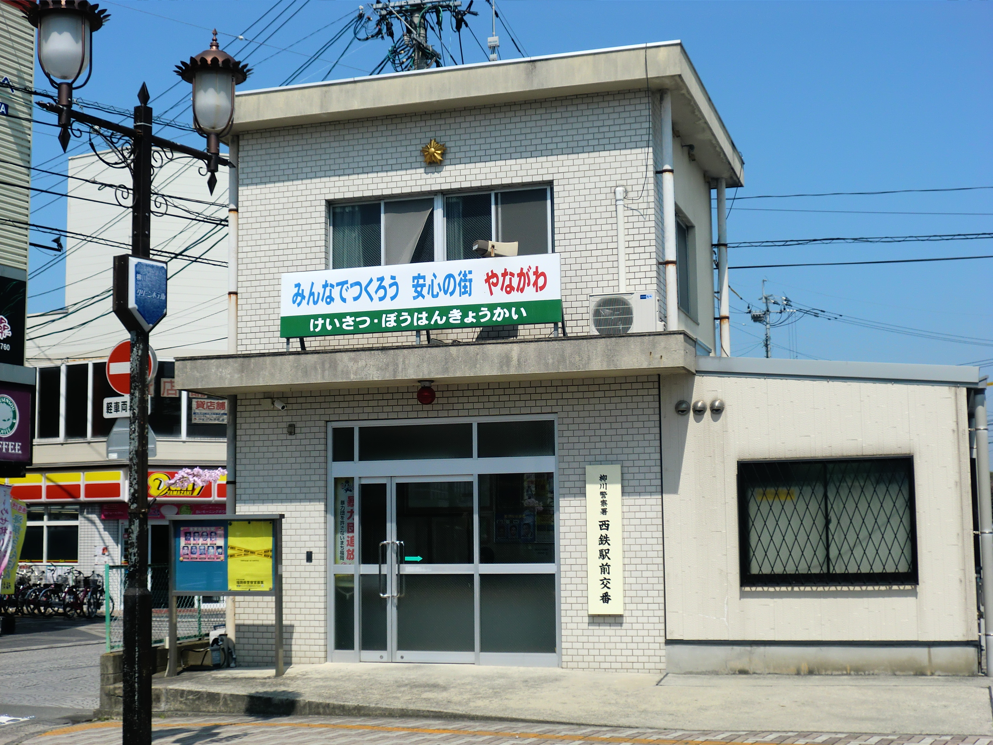 福岡県柳川市にある柳川警察署西鉄駅前（にしてつえきまえ）交番